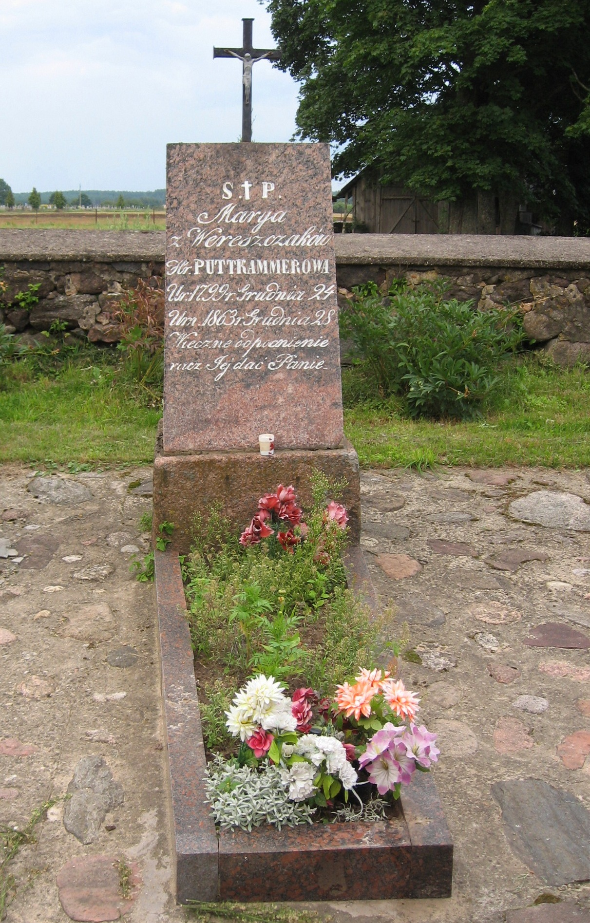 Maryla Wereszczakowna tomb belarus bieniakonie